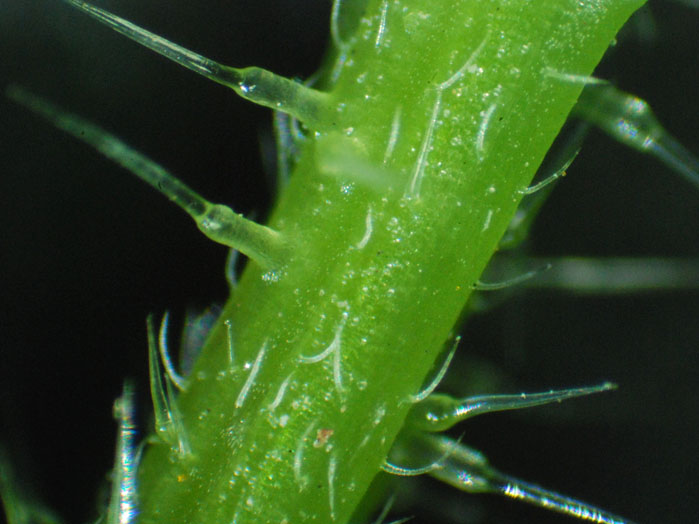 Ortie brûlante, Urtica urens, poils urticants